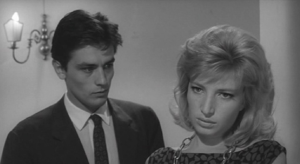 Screenshot del film L'eclisse di Michelangelo Antonioni.